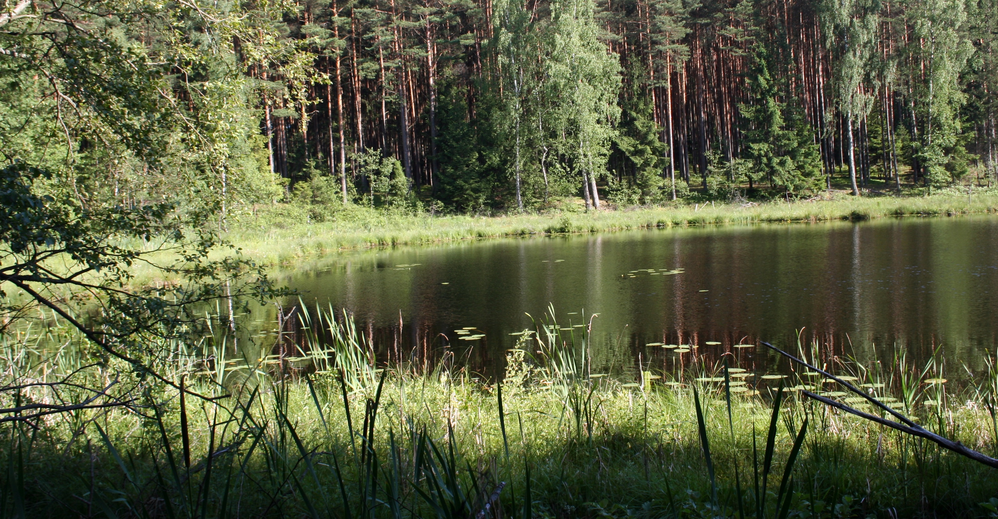 Fragment jeziora Żabinek w rezerwacie Jezioro Ciche